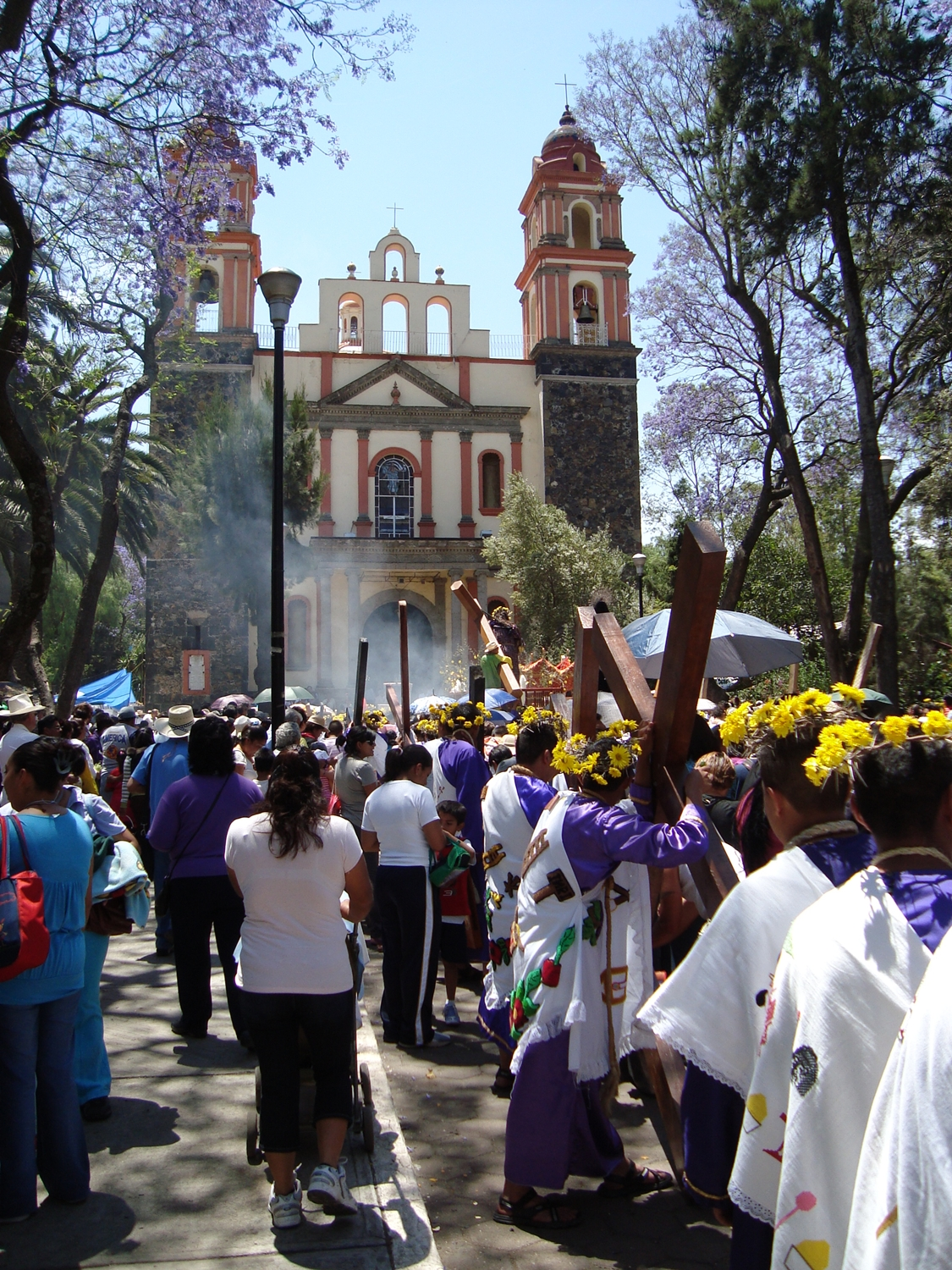 Atrio del Santuario Nacional de Nuestro Señor de La Cuevita de Iztapalapa (México), durante la procesión del Viernes Santo.